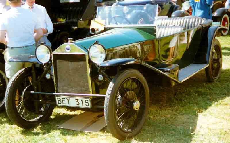 Lancia Lambda Torpedo 1923